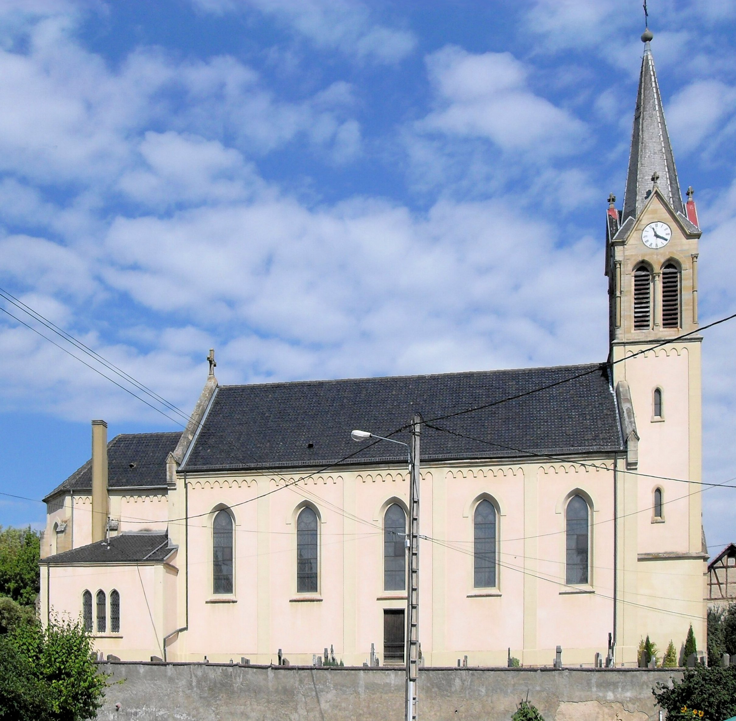 L'église Saint-Maurice à Ranspach-le-Bas